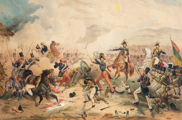 Bataille d'Ingavi. 1841. Gravure du milieu du XIXème siècle.